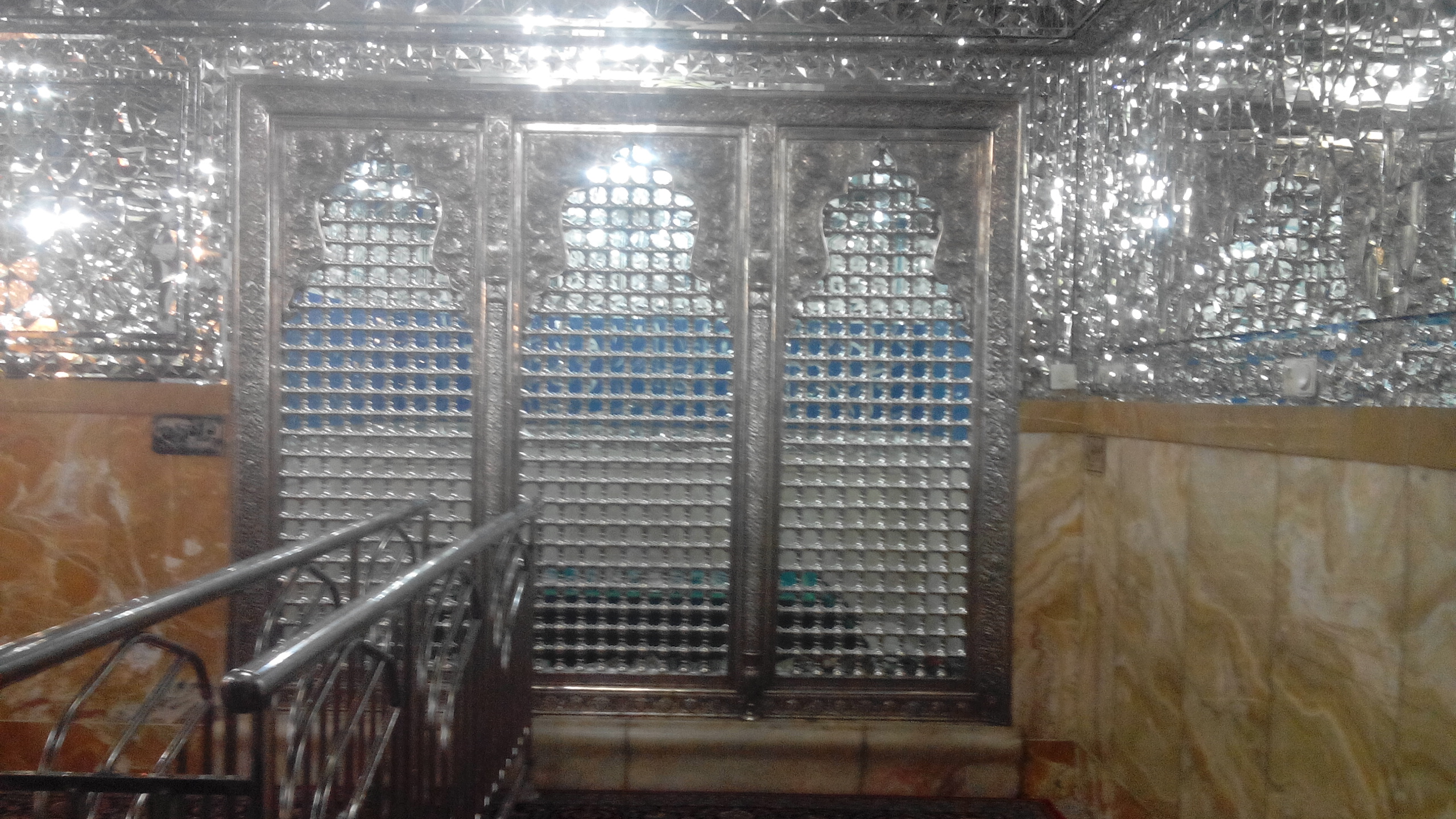 Şeyh Hürr’ü Amuli'nin türbesi